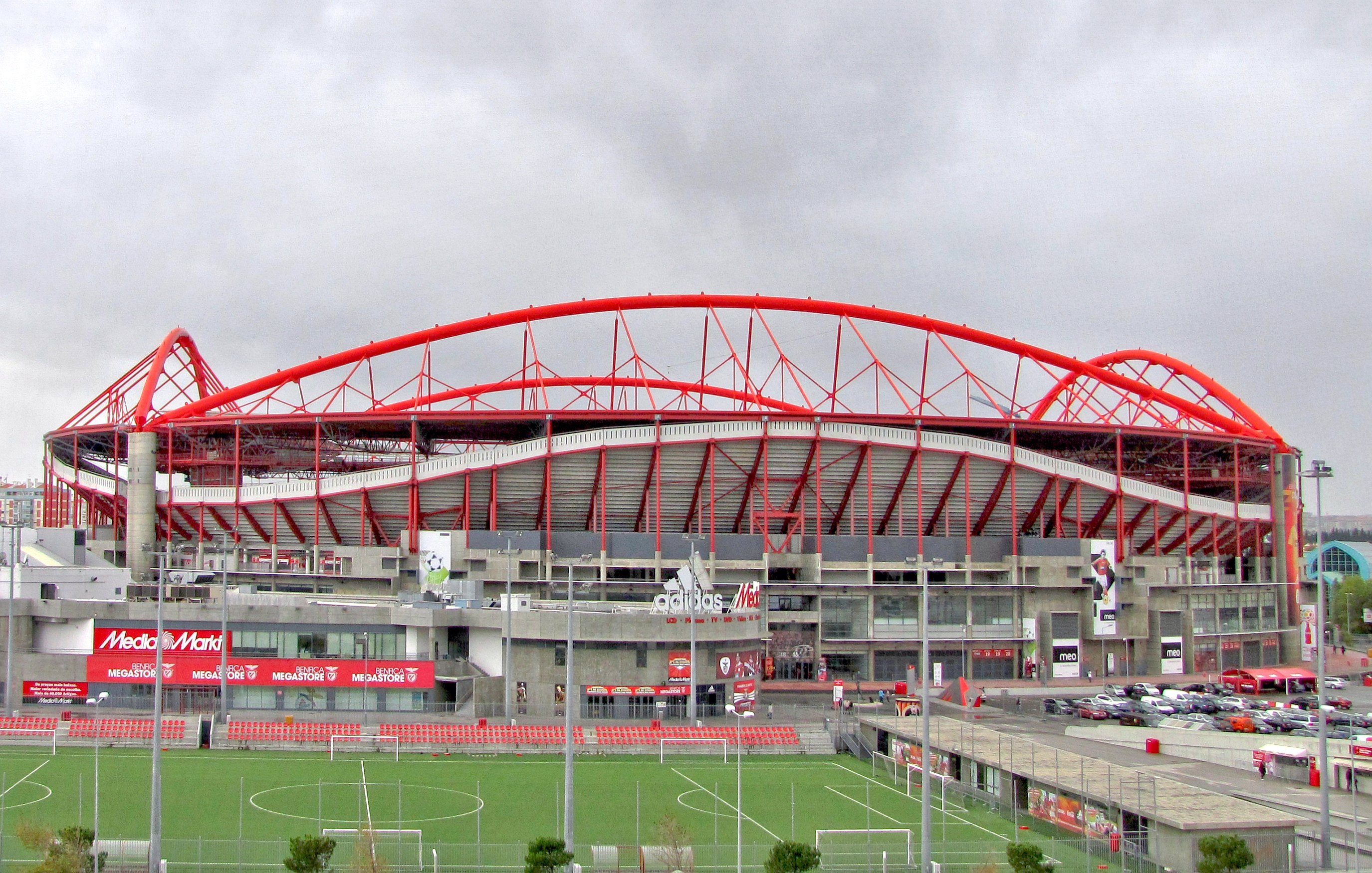 Aussenansicht Estádio da Luz von Benfica Lissabon mit Trainingsplatz vor dem Stadion. Baujahr 2003. Portugal. Foto Wolfgang Pehlemann IMG 7255